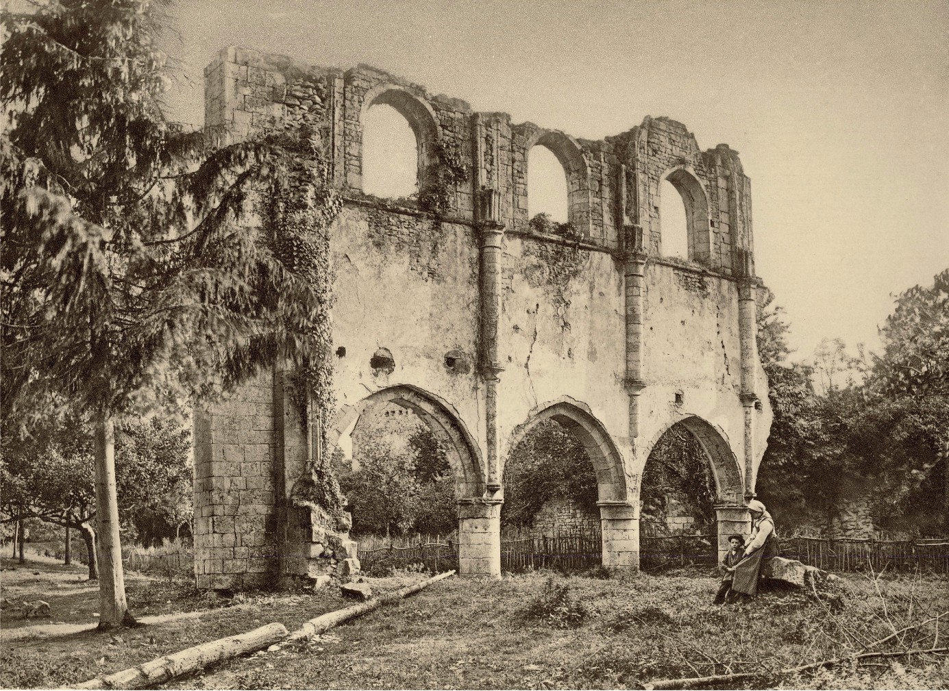 Ruines du choeur gothique de l'abbatiale des Châtelliers, en 1889; destruction en 1906